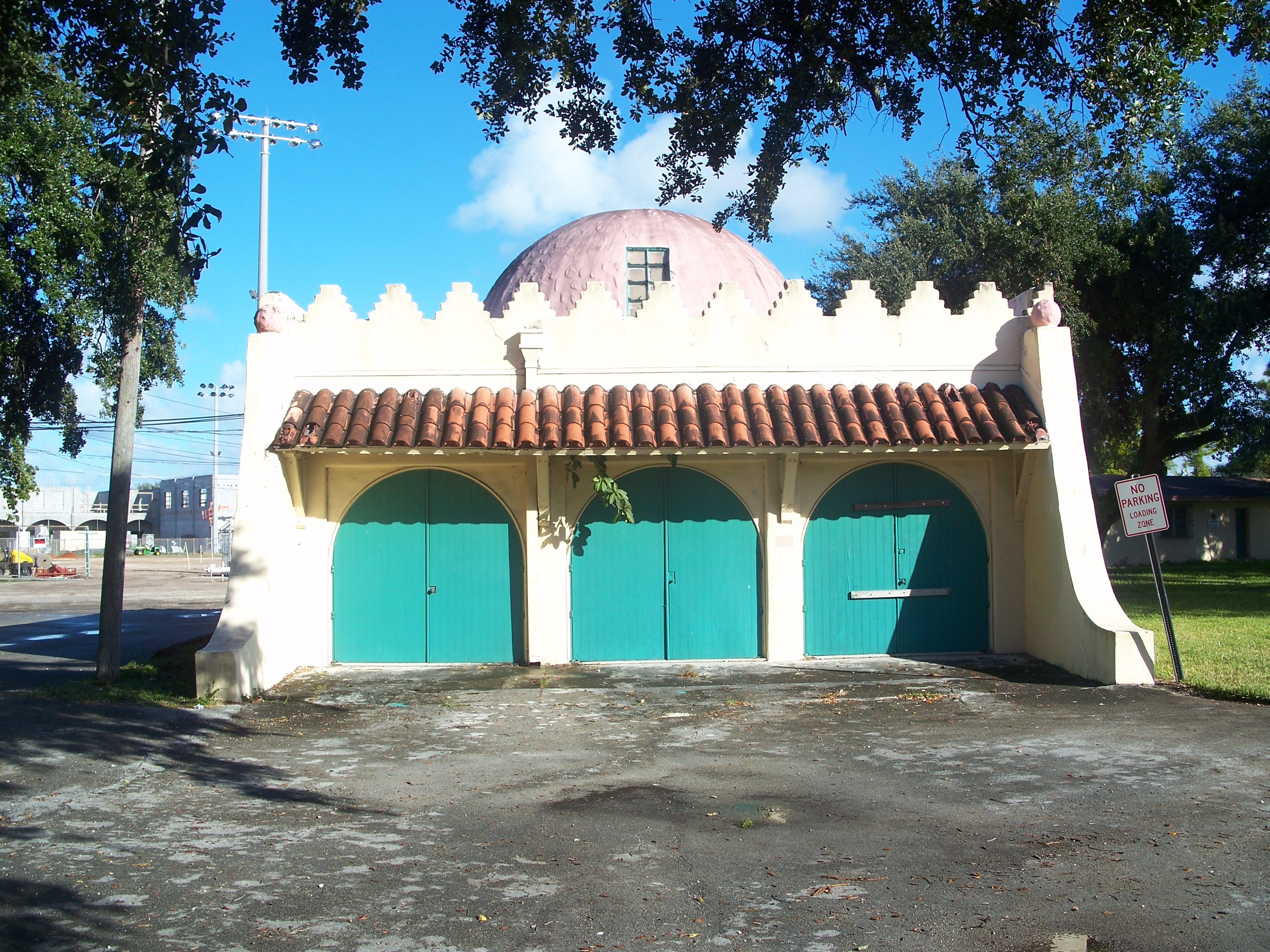 Opa-locka, Florida: Root Building, maybe